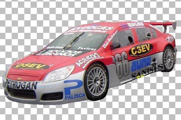 Chevrolet Vectra TRV6. Piloto: Gustavo Tadei.